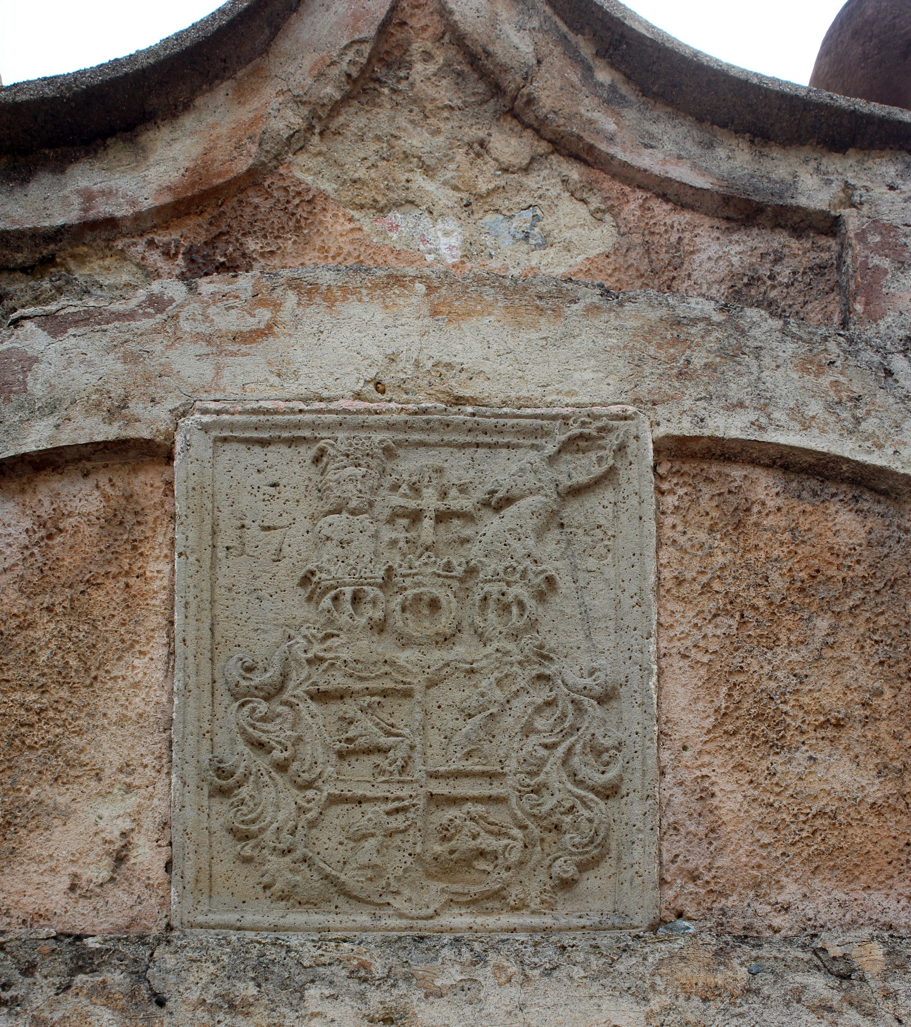 Wappen an der Kellerburg in Sarnthein